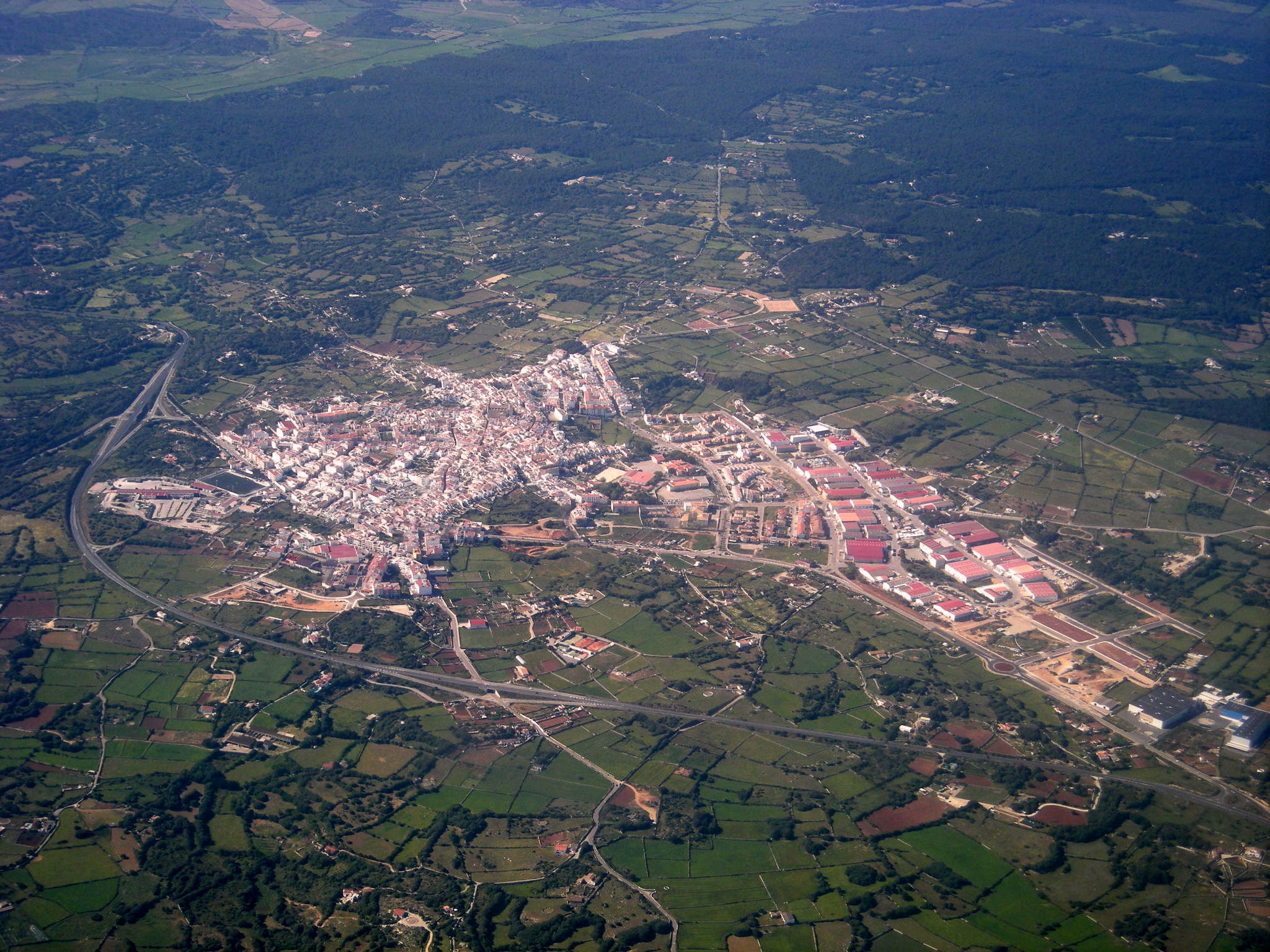 Alaior, des de l'avió